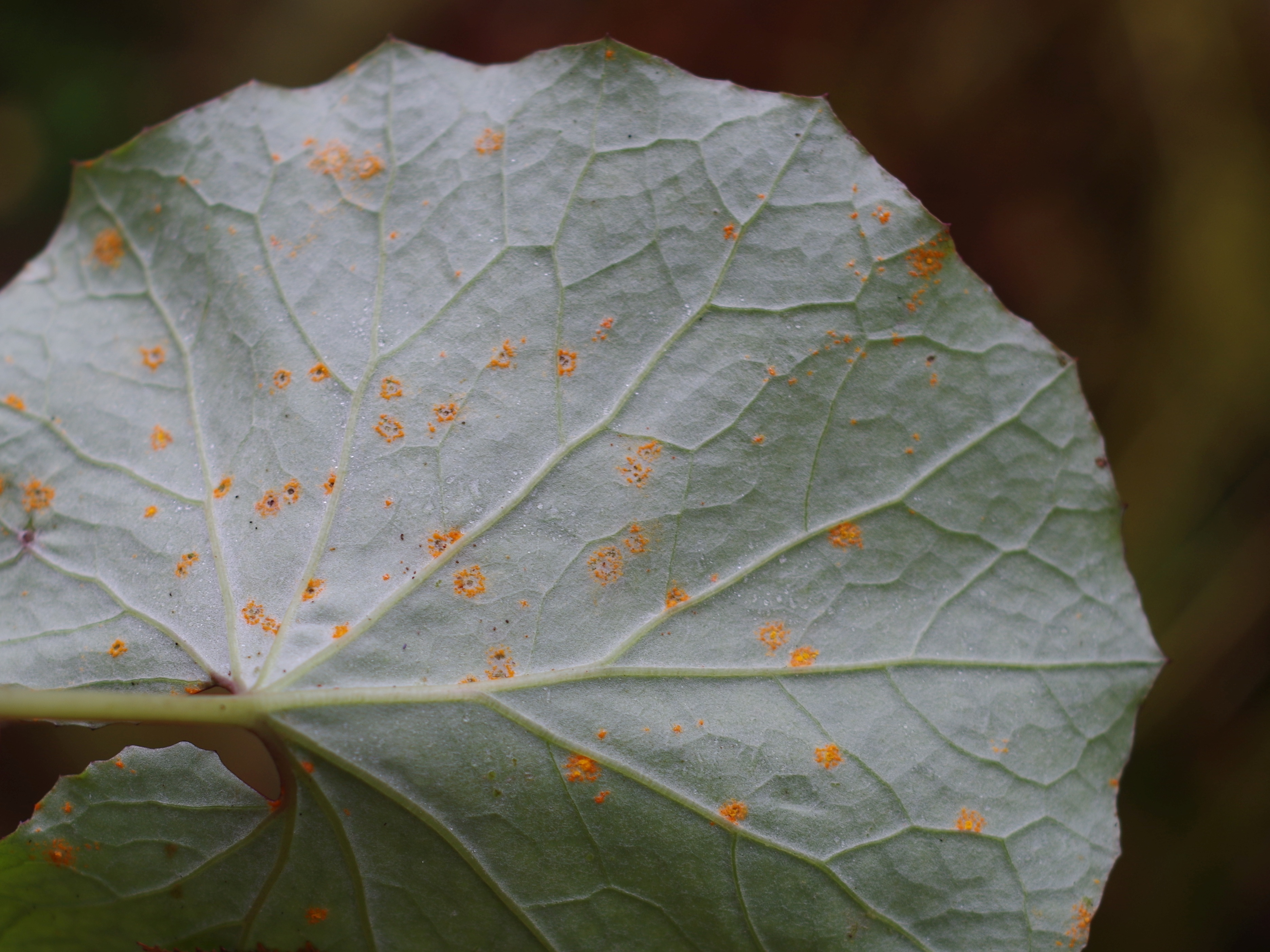 Puccinia poarum on Tussilago farfara (location: Poland)